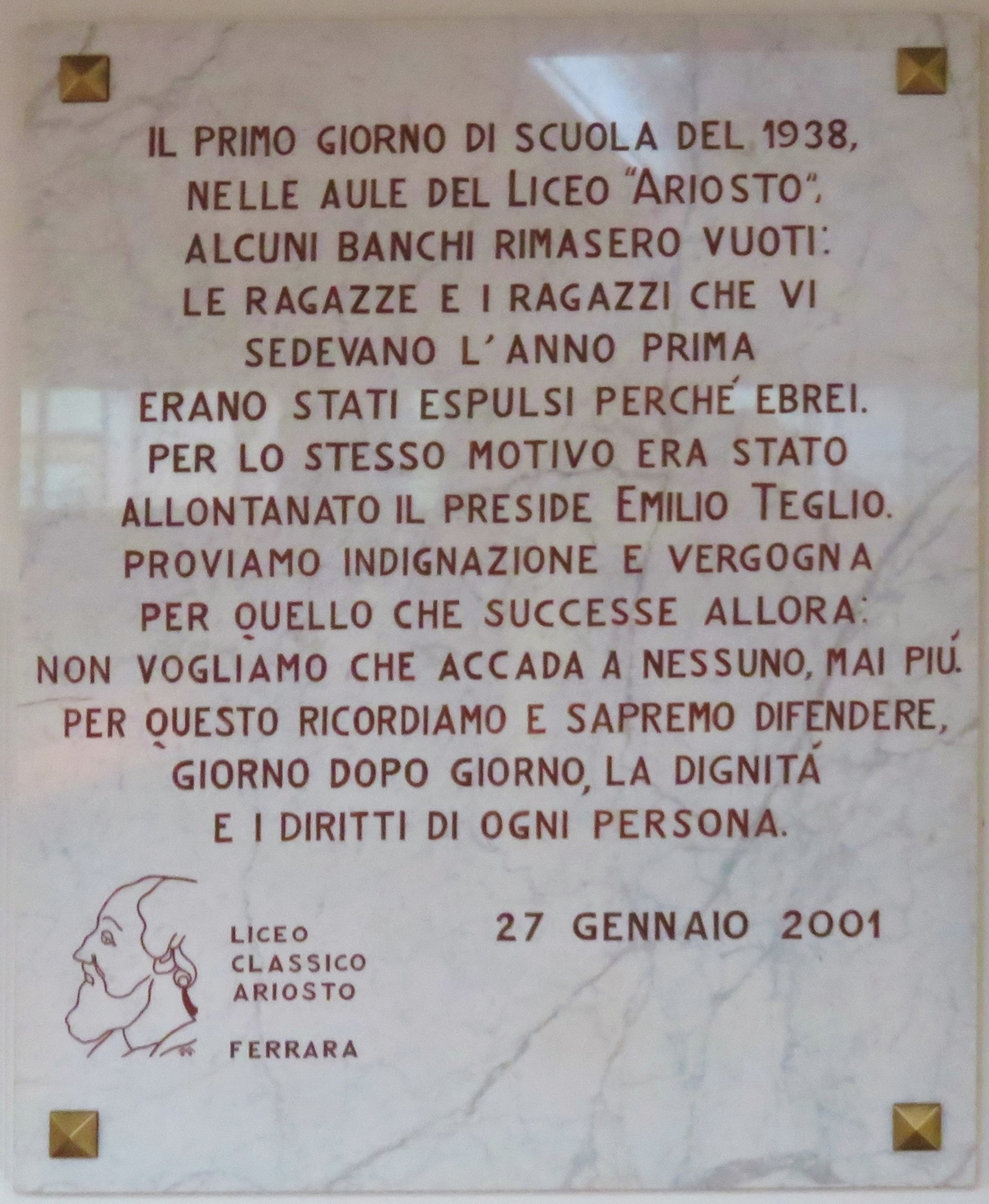 Liceo Ariosto. Epigrafe che ricorda gli espulsi nel 1938 per effetto delle leggi razziali. Tra loro anche il preside dell'Istituto, il professor Emilio Teglio